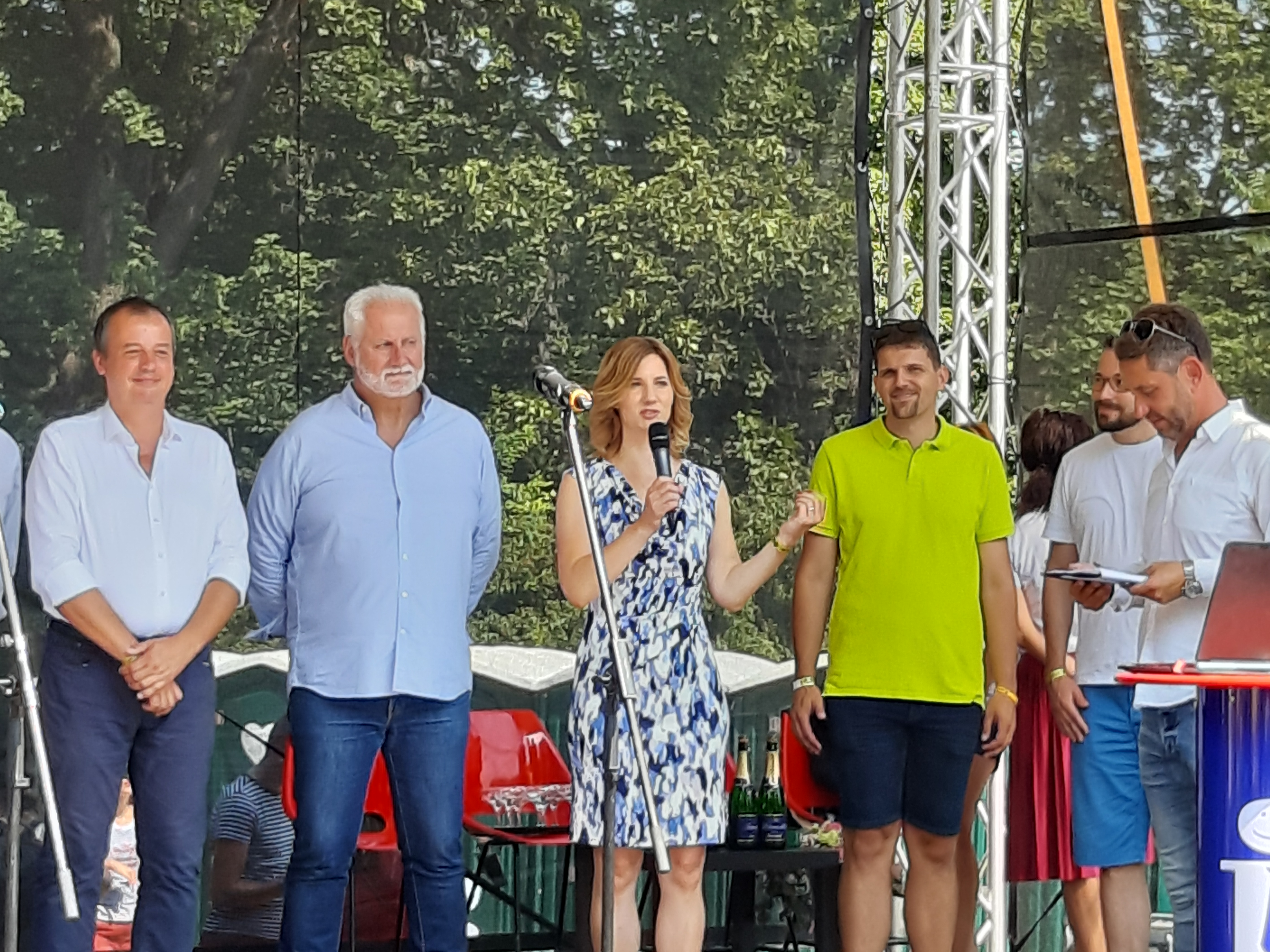 Fotografie pořízena během oslav 15O let činnosti MHD v Brně. Před 15O lety totiž projela Brnem první zkušební tramvaj tažená koňmi, a Brno se tak stalo prvním městem současného Česka, které disponovalo kolejovou dopravou. Tato akce - největší oslava v historii DPMB - "vyhnala" do Lidické ulice značné množštví zrenovovaných vozů.